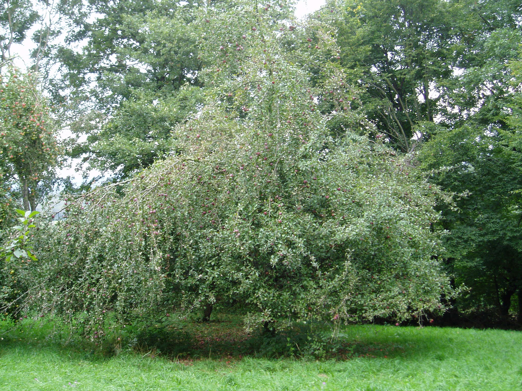 Berner Rosenapfelbaum in voller Pracht